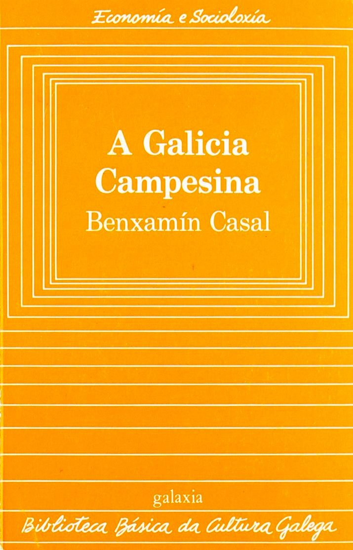 Biblioteca Básica da Cultura Galega, 22, A Galicia Campesina, Benxamín Casal.jpg